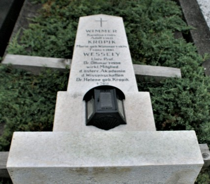 Othmar Wessely-Friedhof Döbling